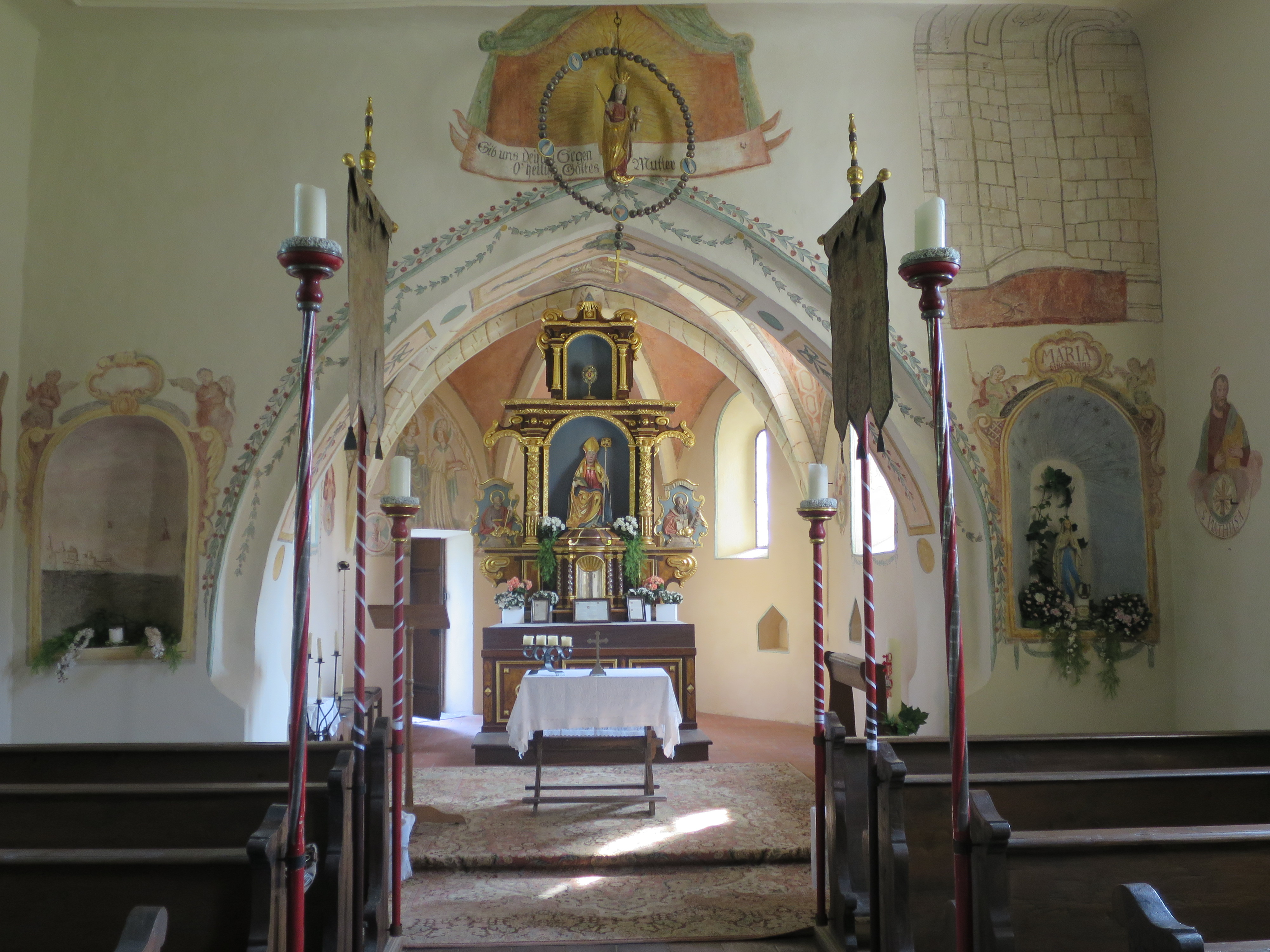 Innenraum der Kapelle St. Ulrich bei Sauerlach.